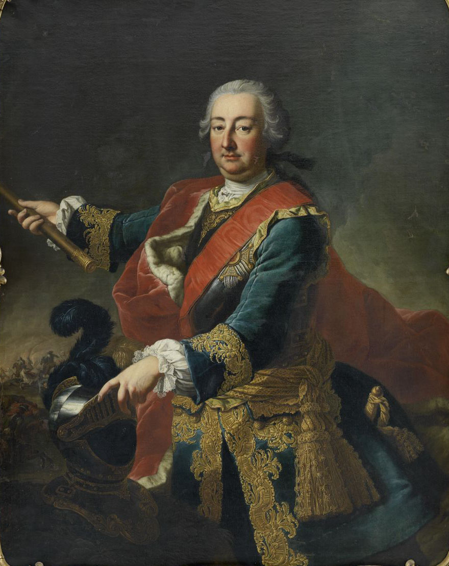 Fürst Karl August Friedrich von Waldeck (1704-1763)